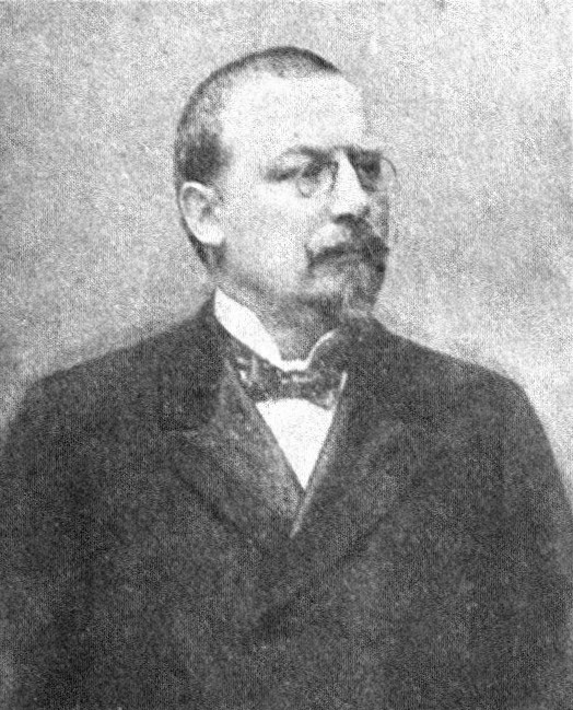 Österreichischer Politiker, Reichsratswahl 1907, Name siehe Dateiname